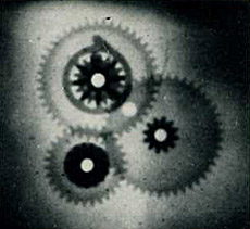 Neutrographie von Polyamid-Zahnrädern im Innern eines Waschmaschinen-Programmschaltwerks aus Stahlblech, Aufnahme aus dem Forschungszentrum Jülich 1976